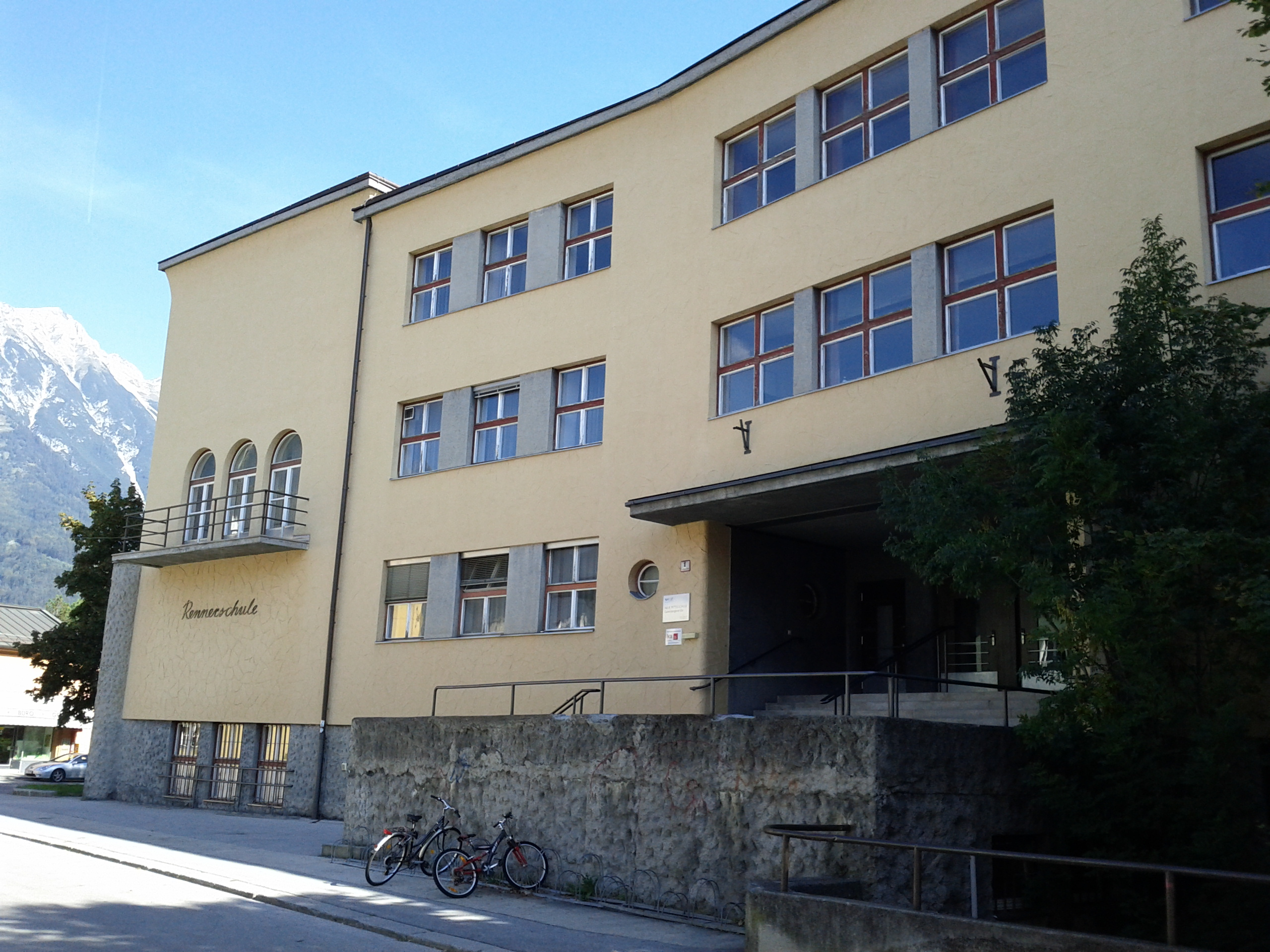 Rennerschule mit Einfriedung This media shows the remarkable cultural object in the Austrian state of Tyrol listed by the Tyrolean Art Cadastre with the ID 72764. (on tirisMaps, pdf, more images on Commons, Wikidata)